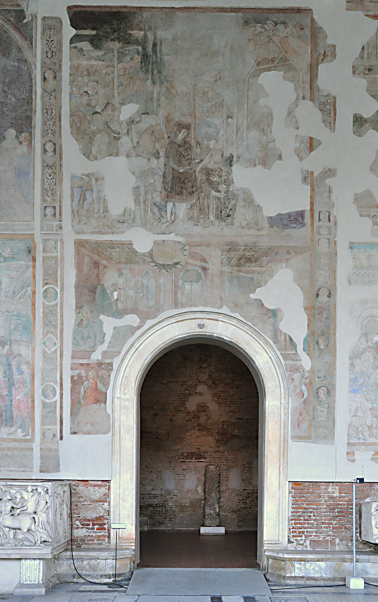 Ingresso della Cappella Ammannati in Campo Santo a Pisa